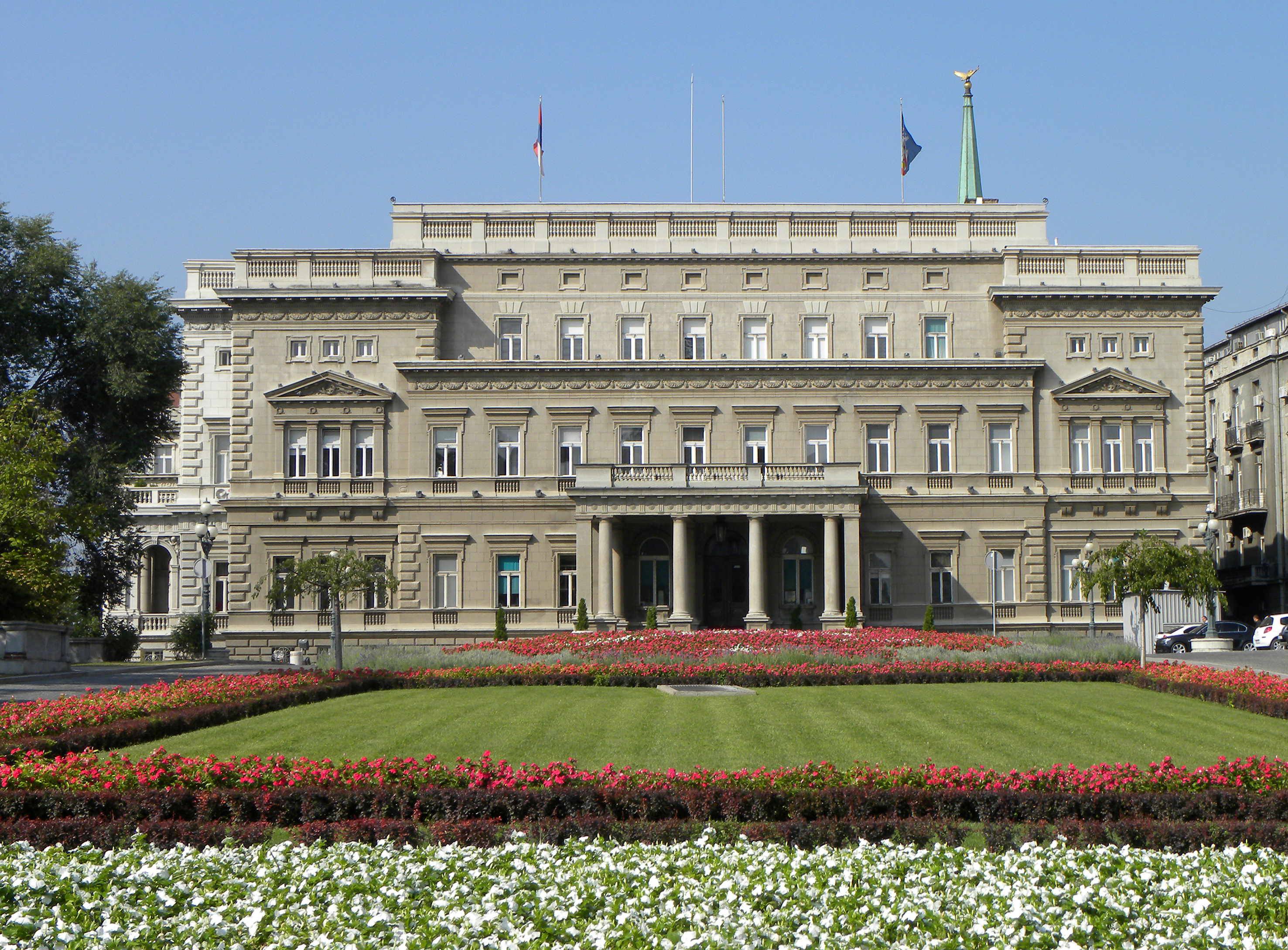 Beograd Zgrada Starog dvora Dragoslava Jovanovića 2